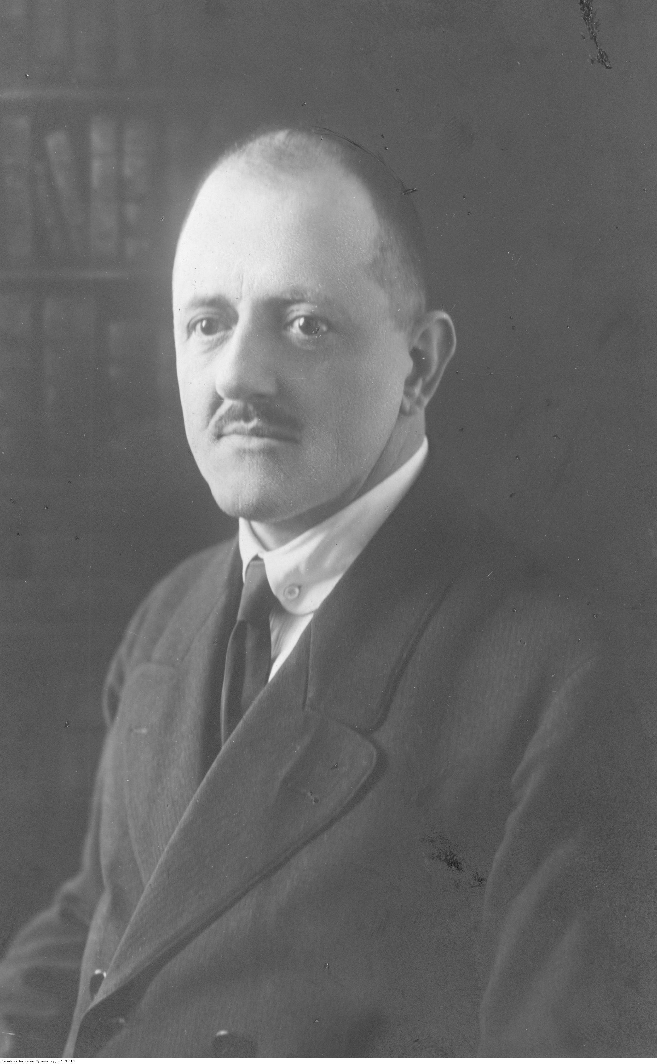 Karol Wątorek (1875-1944) - polski inżynier budowy kolei